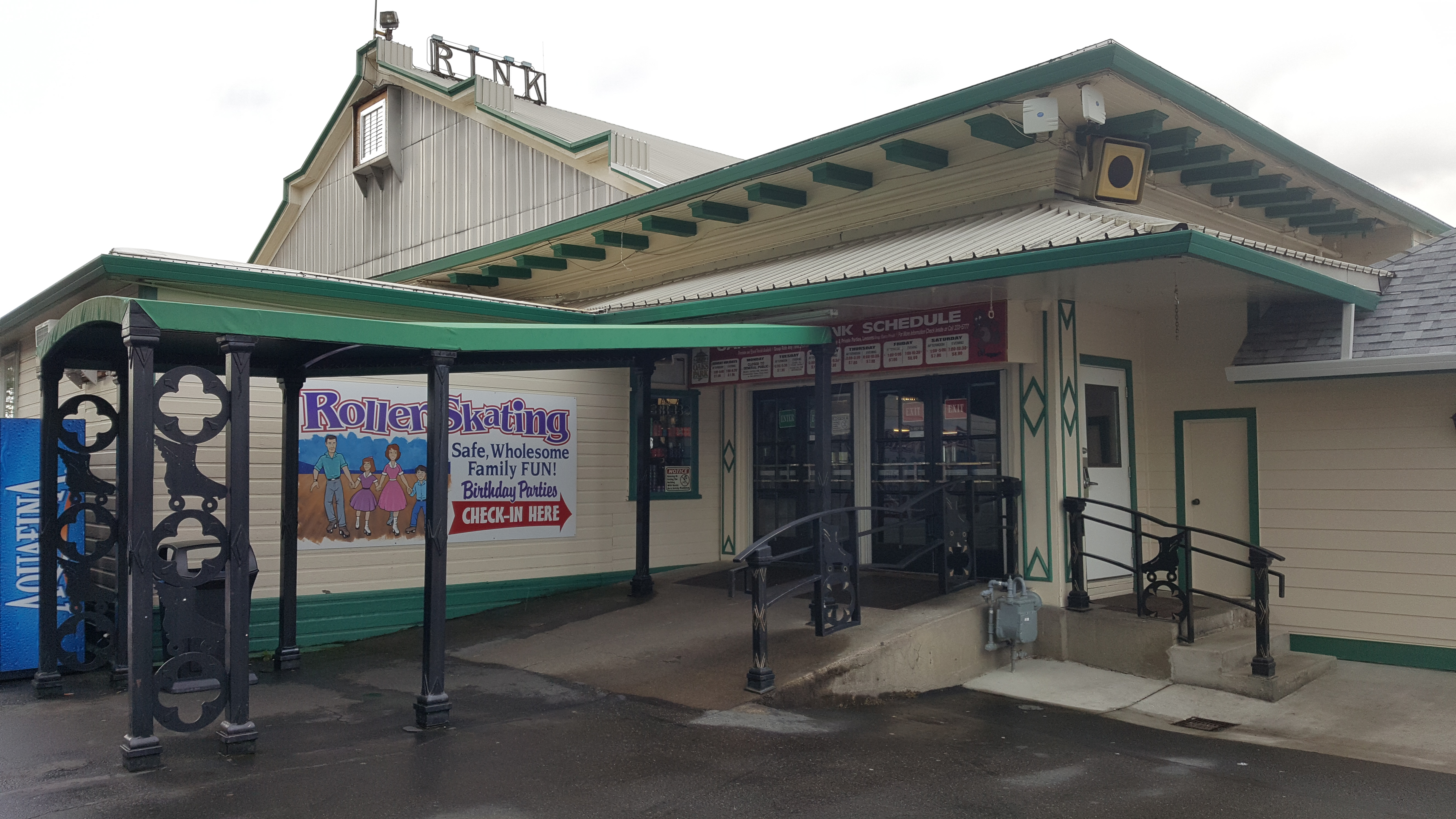 Roller rink